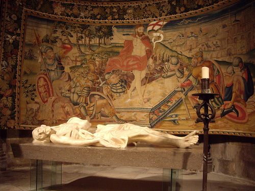 Crist jacent de D. Fita